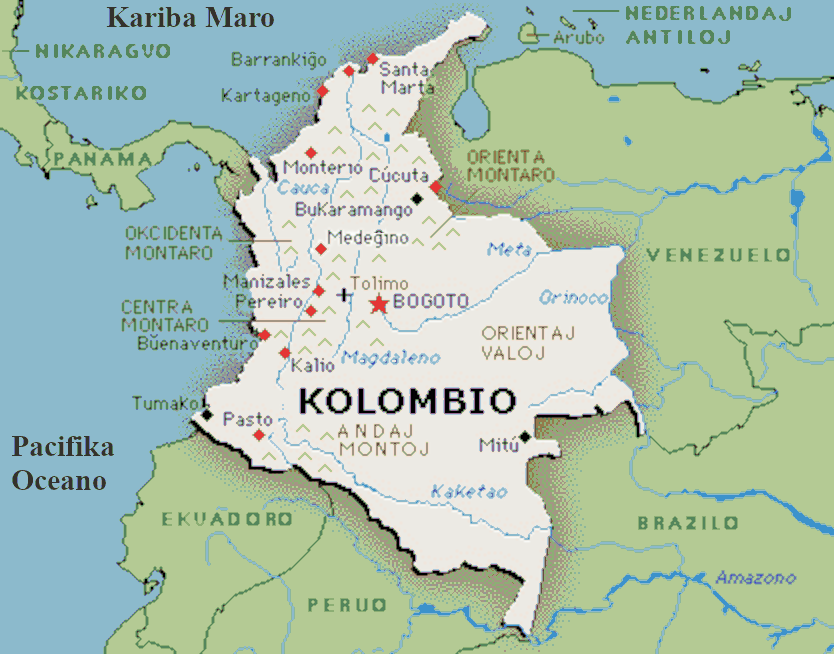 Desegnaĵo farita de Luis Guillermo Restrepo Rivas, kiun la aŭtoro liveras por publika kaj libera uzado far iu ajn homo aŭ maŝino.